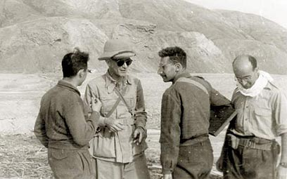 סיור חיל המדע בנגב. מימין: פרופ' ישראל דוסטרובסקי, פרופ' עקיבא פרומן, גיאולוג איטלקי ואיש צוות לא מזוהה.